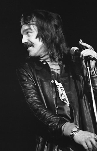 Convocation hall, Toronto, 1974